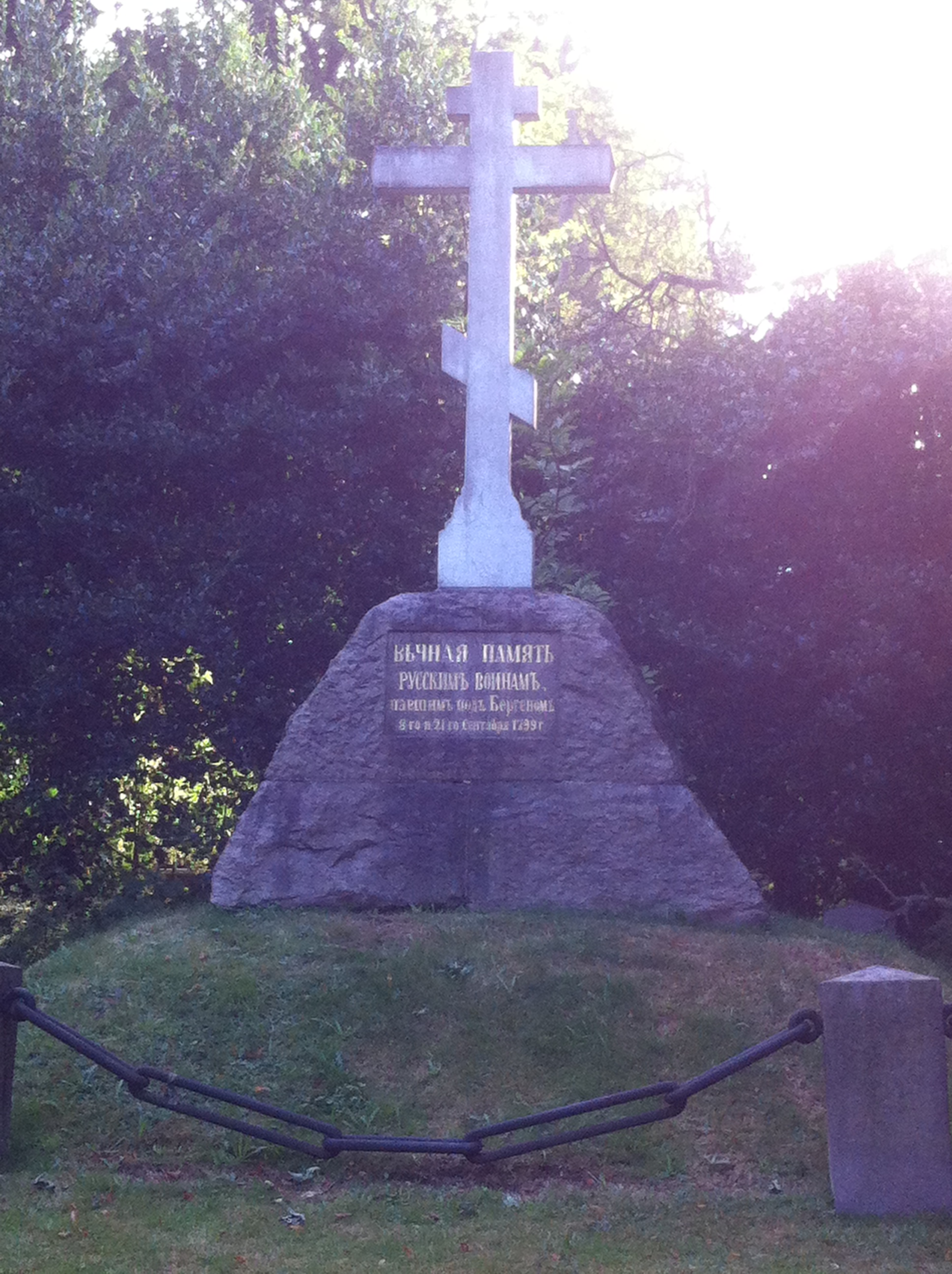 Het Russenmonument uit 1901 in Bergen (NH) ter herinnering aan de gesneuvelde Russische militairen tijdens de Slag bij Bergen in 1799.